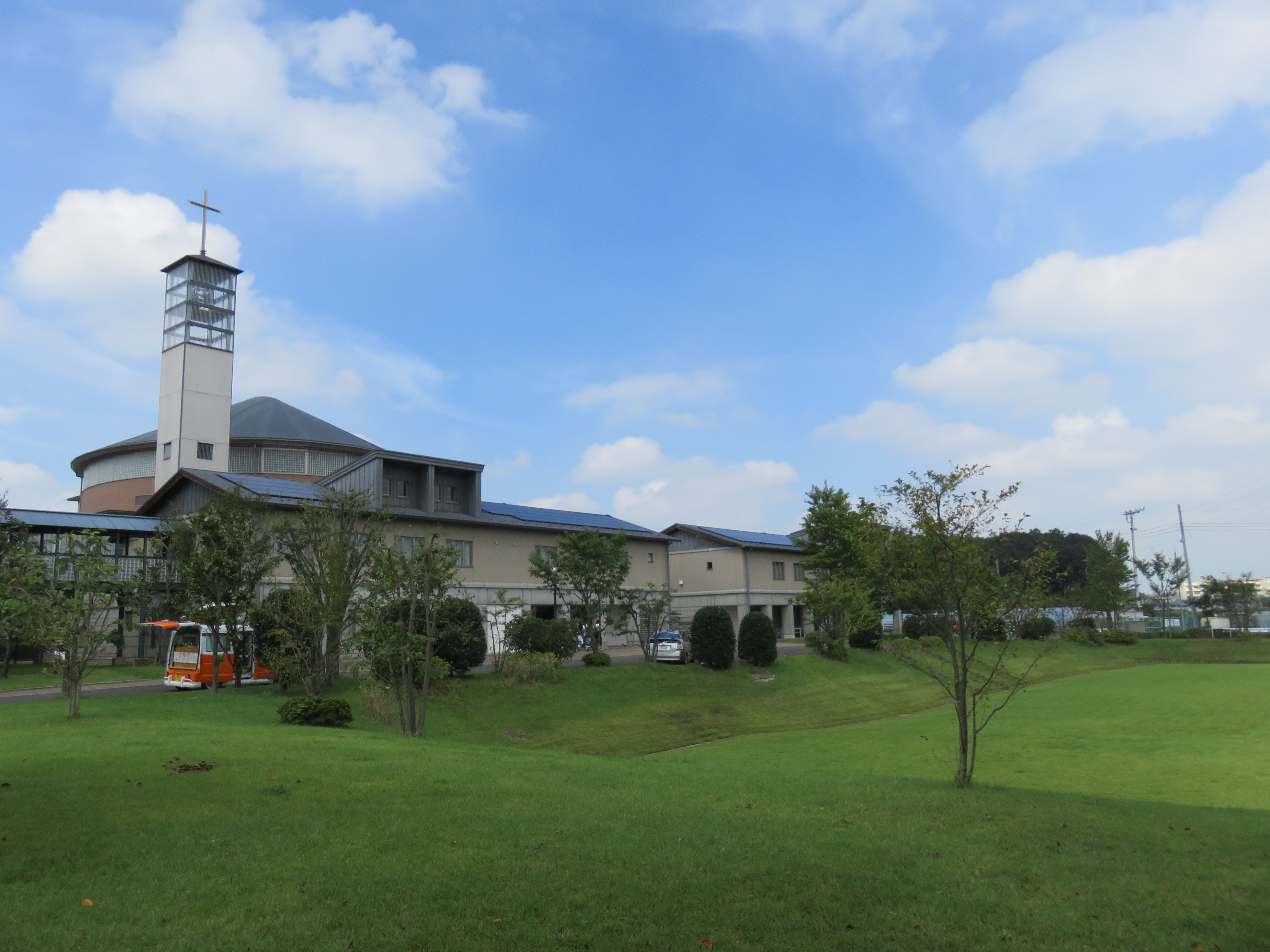 北キャンパス